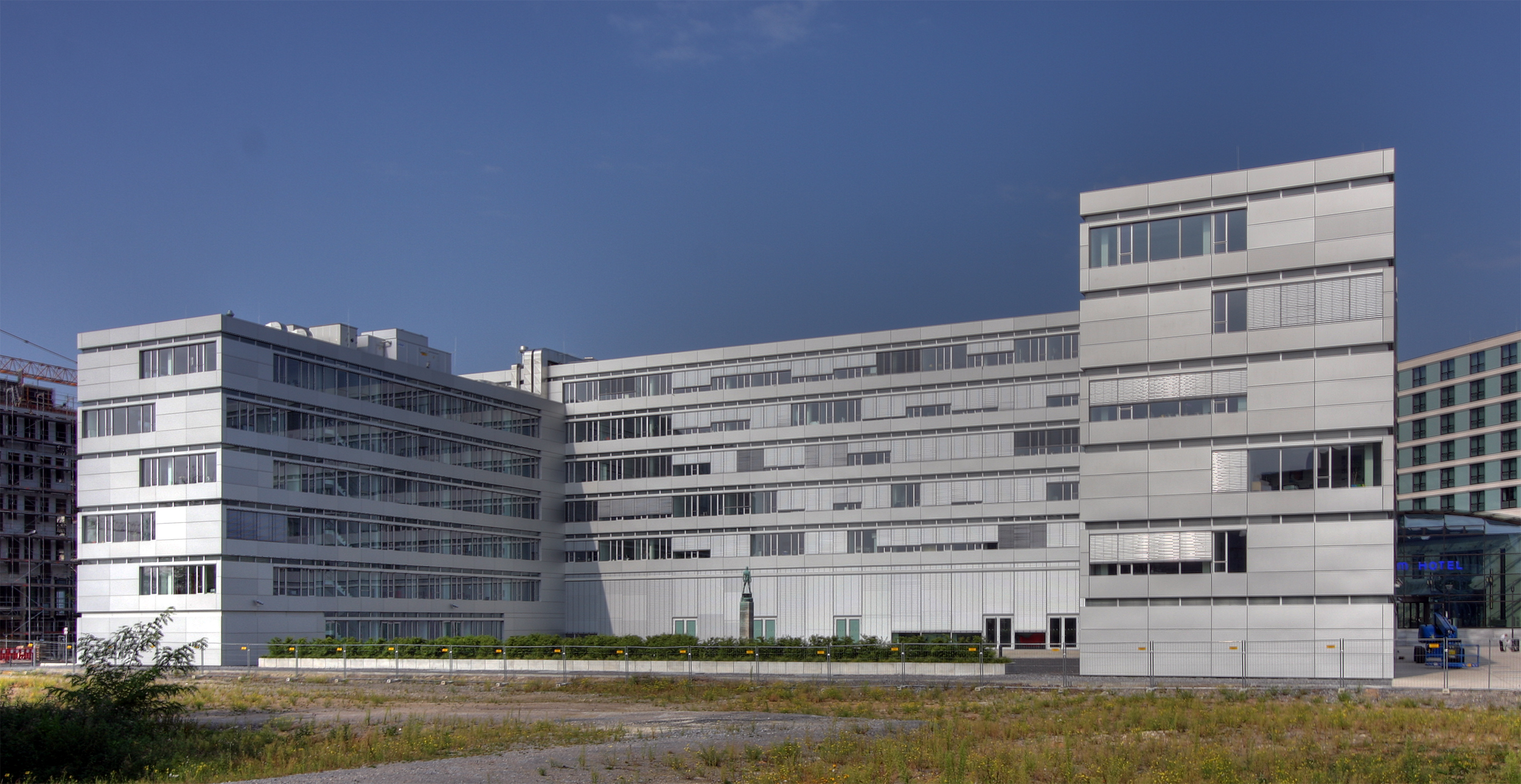 VDI Technologiezentrum in Düsseldorf, Zentrale des VDI